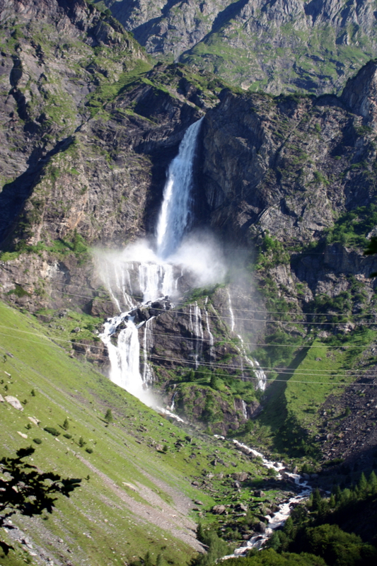 Cascate del serio Apertura straordinaria del 15-07-2007 Matteo Baroni